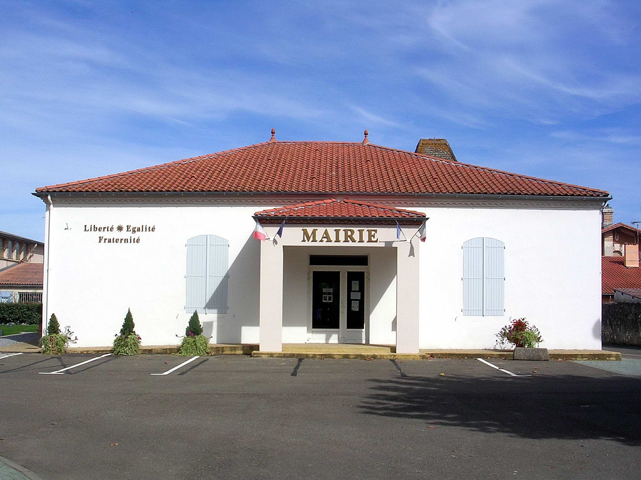 Mairie de Cauna, dans le département français des Landes